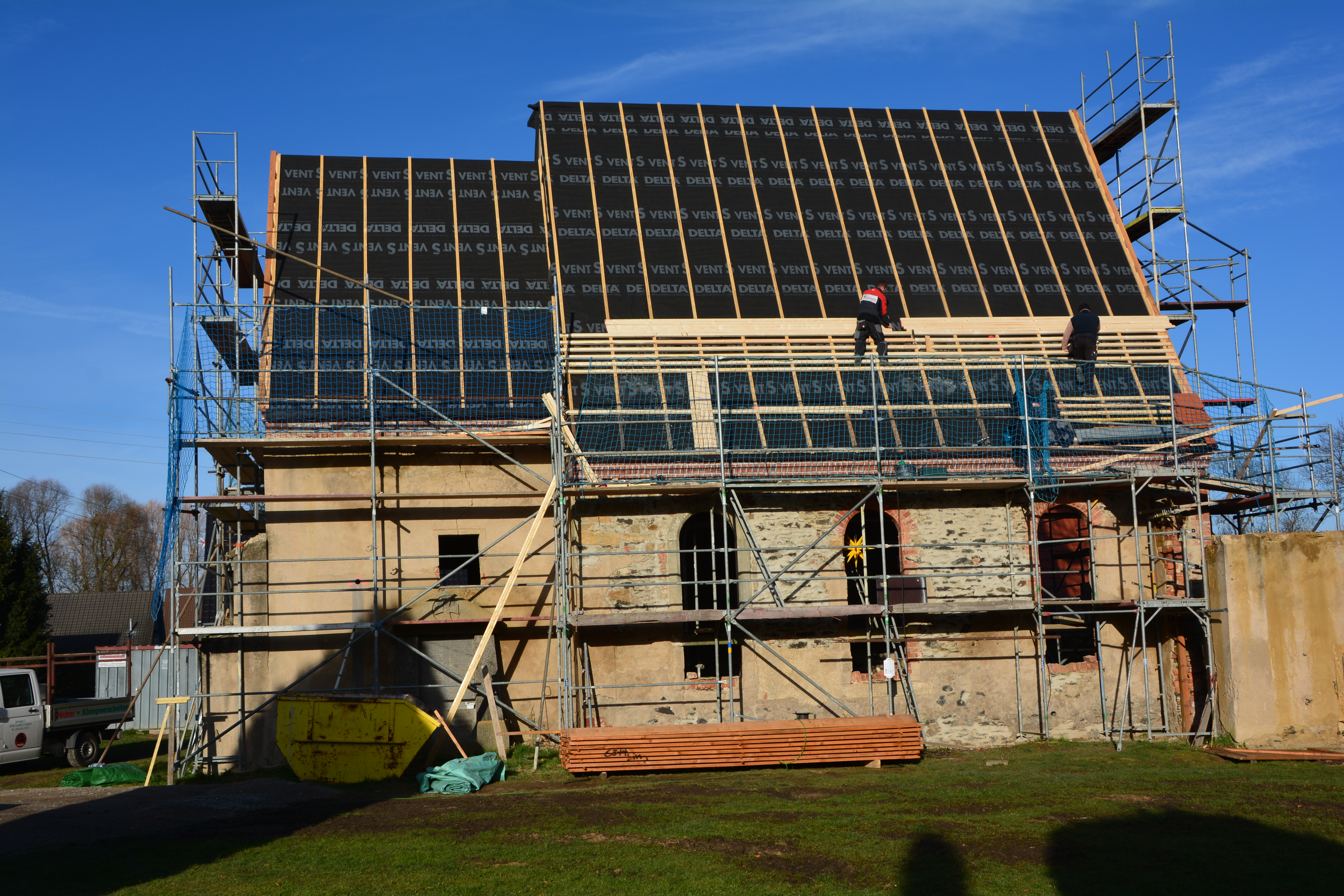 Kirche in Canitz (Liebschützberg):umfangreiche Notsicherung, einschließlich der Sicherung des Mauerwerks teilweise aus dem 14.Jahrhundert bestehend. Das Dach über den Kirchenschiff und dem Turmstumpf bildet einen geschlossenen Kirchenraum, ähnlich der vor 700 Jahren errichteten Canitzer Kirche. Und am 11.11.2017 war Richtfest, ein gutes Zeichen!